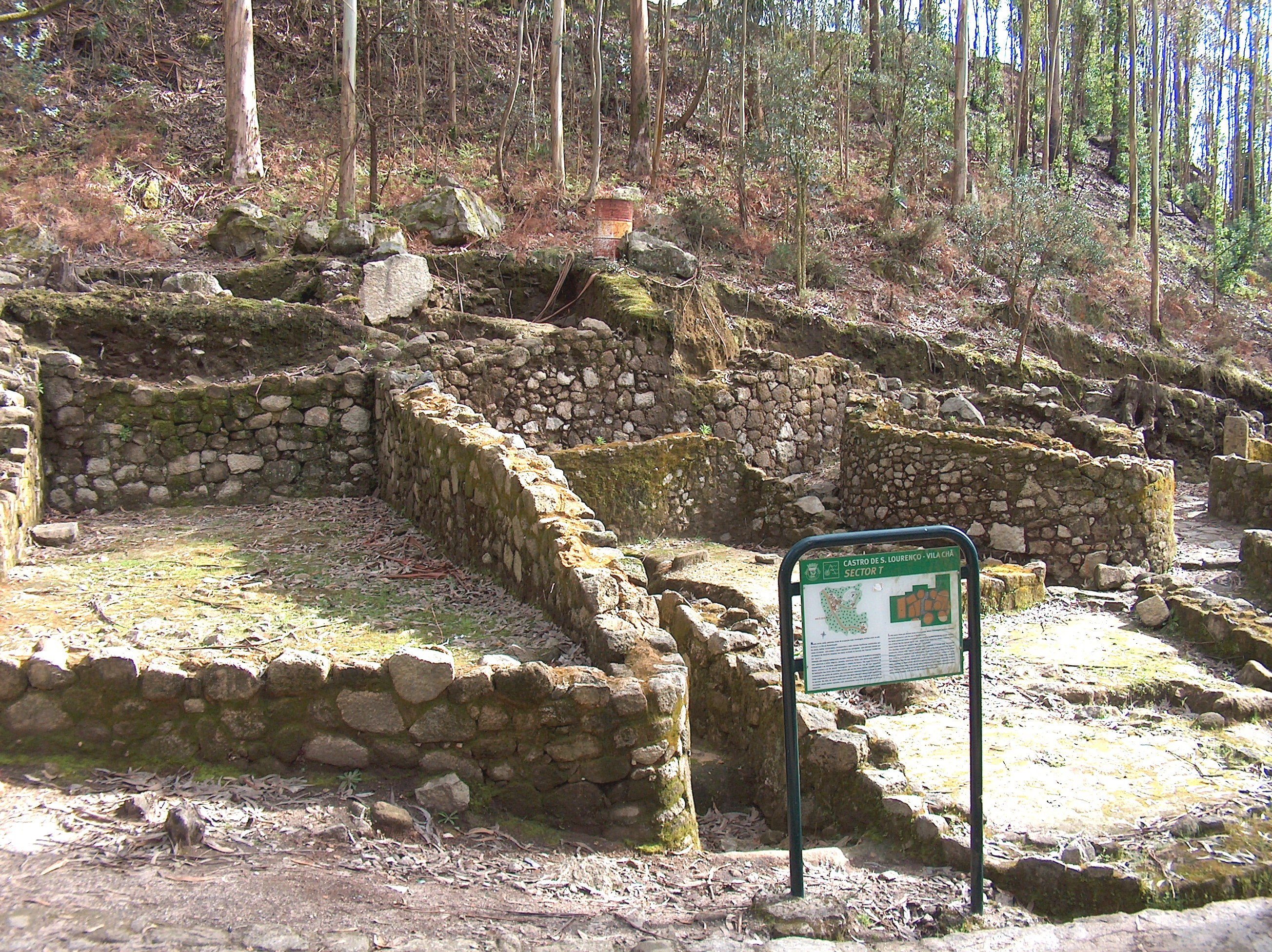 Castro de São Lourenço. Castro de São Lourenço, na freguesia de Vila Chã,concelho de Esposende, distrito de Braga, Portugal.